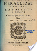 frontispice livre edité en latin par Craigus en 1593